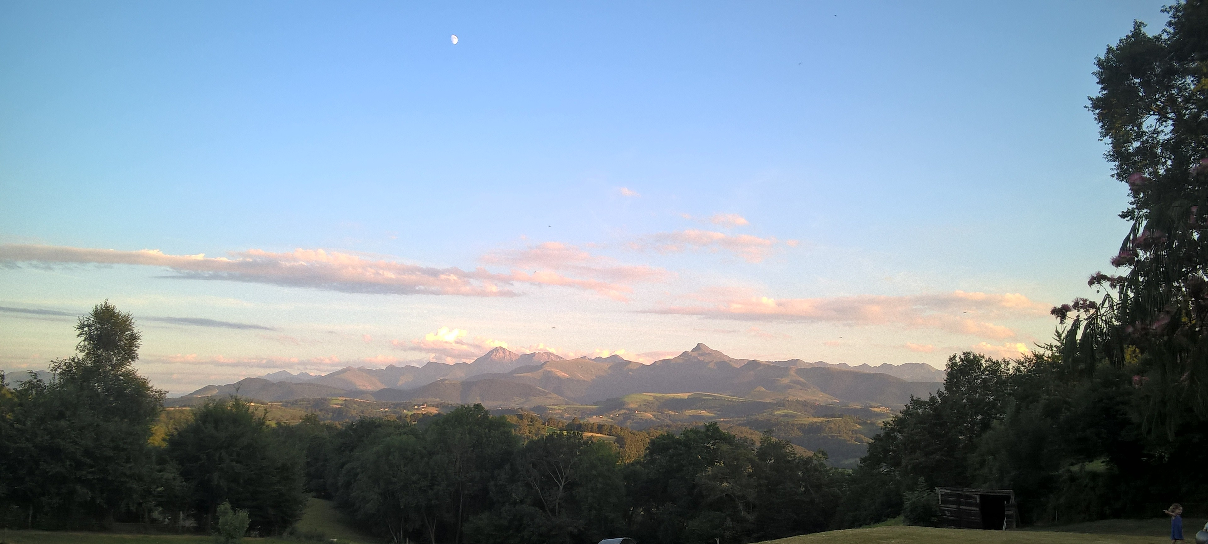 Vue des Pyrénées, photo prise depuis la route de Loucrup